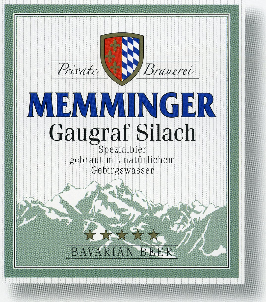 Etikett des Gaugraf Sillach, einem Spezialbier der Memminger Brauerei